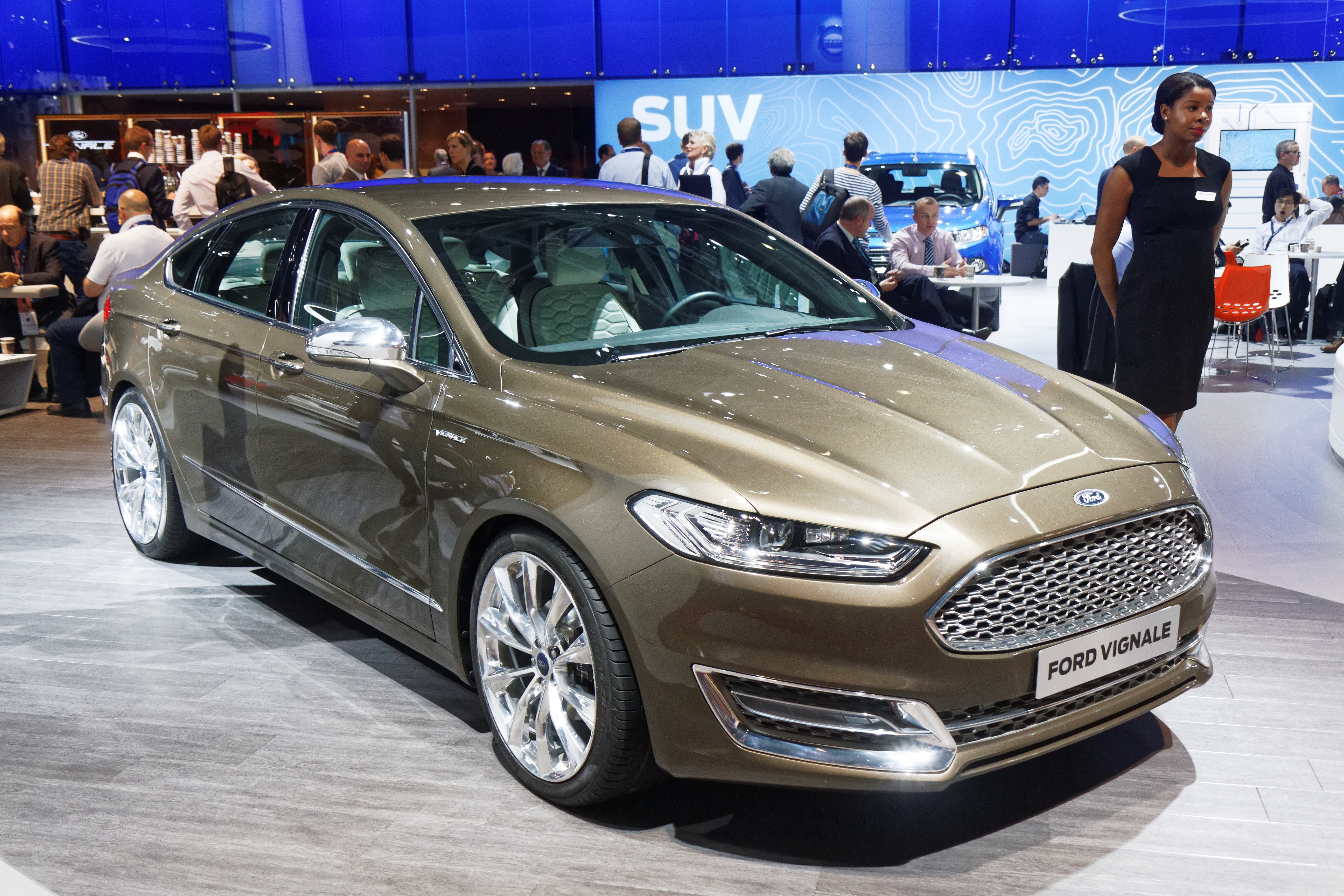 Une Ford Vignale présentée lors du mondial de l'automobile de Paris 2014.